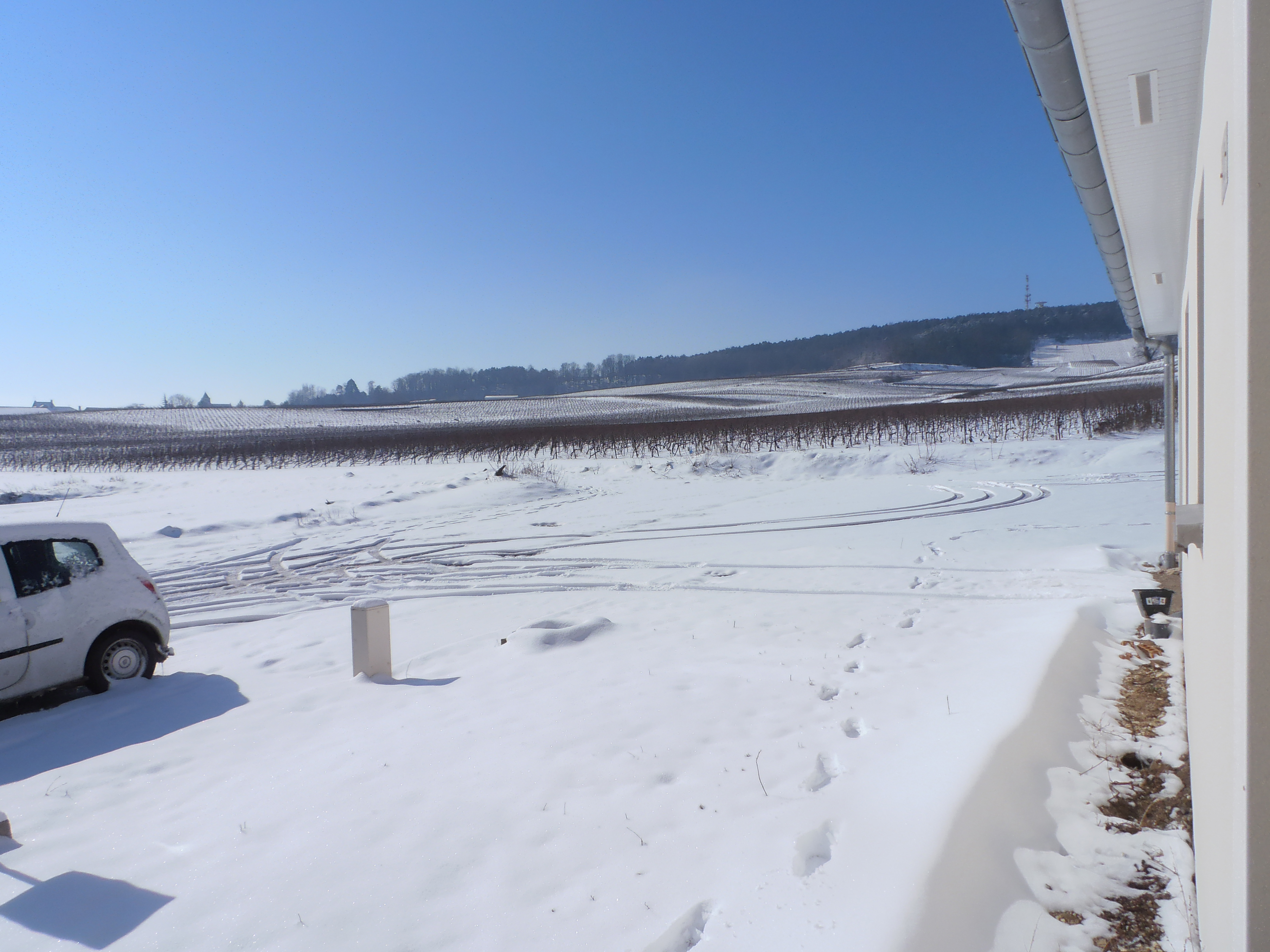 vigne de vrigny en hiver avec l antenne de vrigny au fond